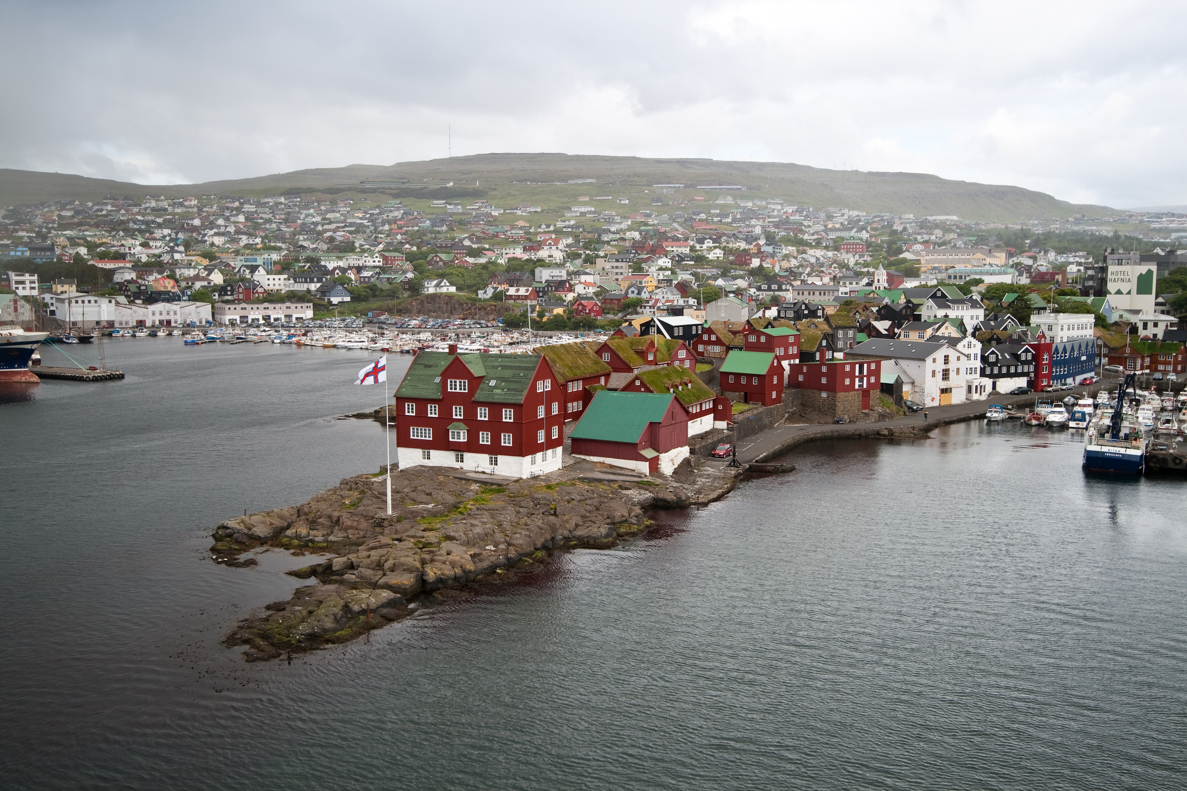 Tinganes, Tórshavn, Faroe Islands